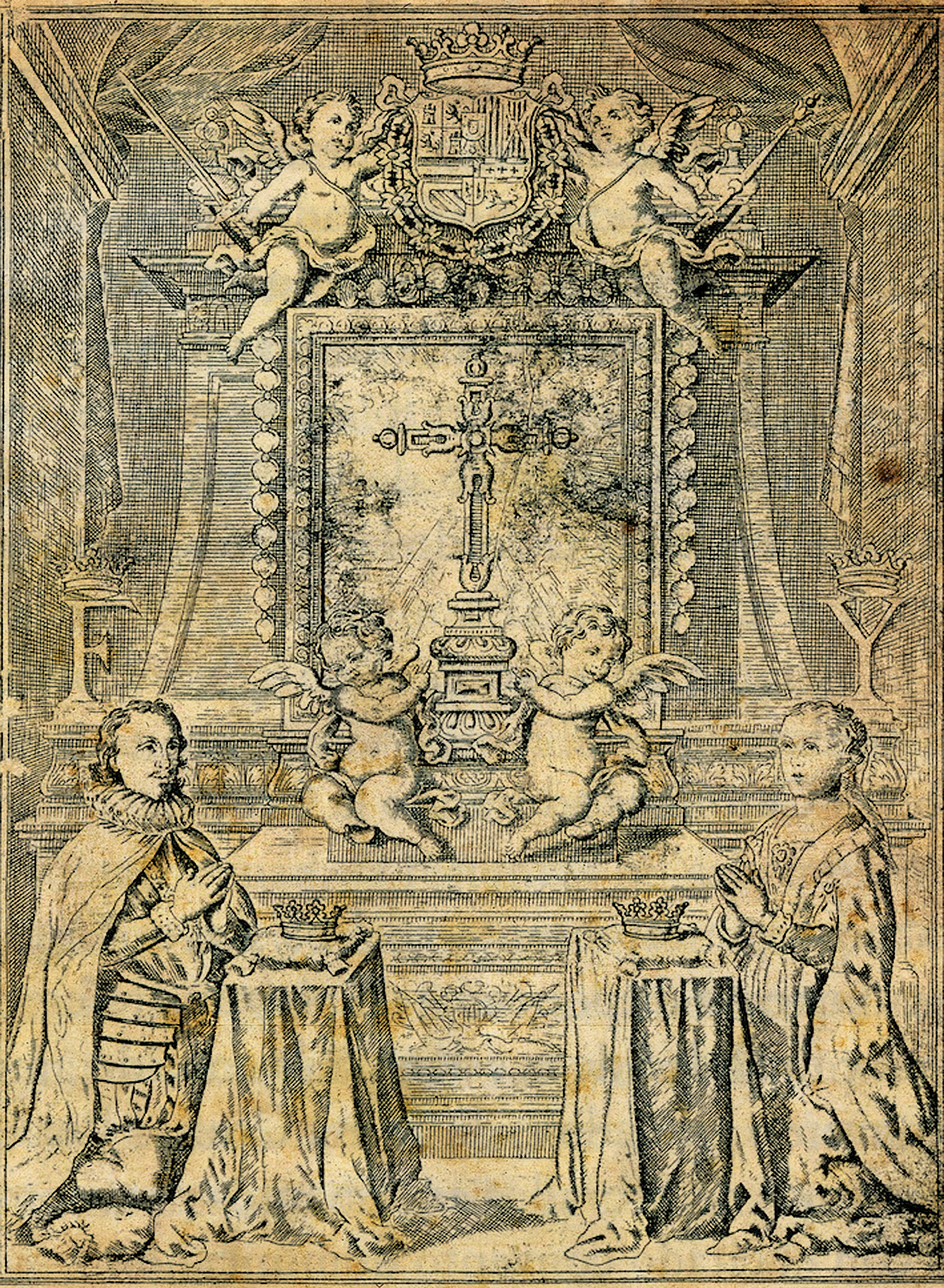 Los Reyes Católicos adorando a la Santa Cruz, titular del Convento granadino.